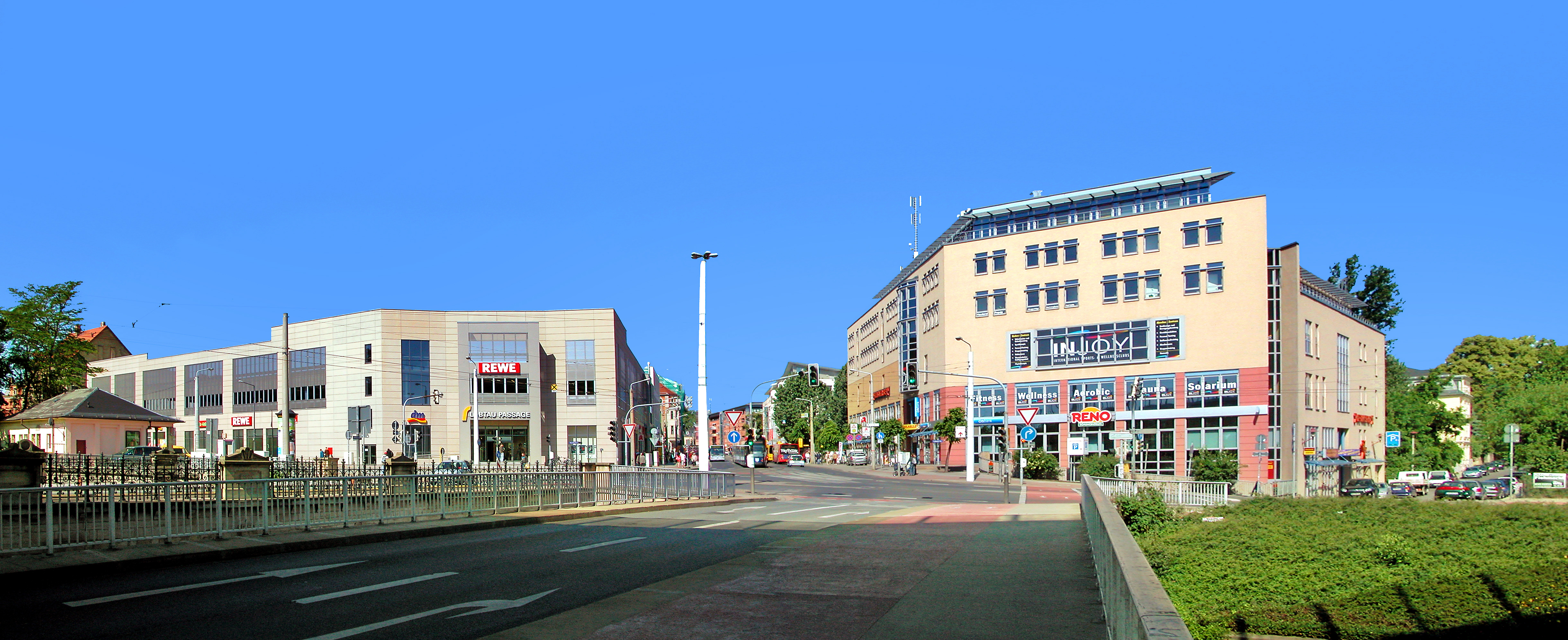 13.06.2009 01159 Dresden-Löbtau: Blick von der Bismarck-Brücke über die Weißeritz nach Westen zu Kreuzung Tharandter / Kesselsdorfer Straße: Links auf dem Areal des historischen "Drei-Kaiser-Hofs" (GMP: 51.043303,13.703181) das 2009 eröffnete EKZ Löbtau Passage. Schon ein Jahrzehnt vorher entstand die Bebauung rechts (GMP: 51.043971,13.703771), die sich nun EKZ Dreikaiserhof nennt. [DSCN37886-36887.TIF]20090613030MDR.JPG(c)Blobelt